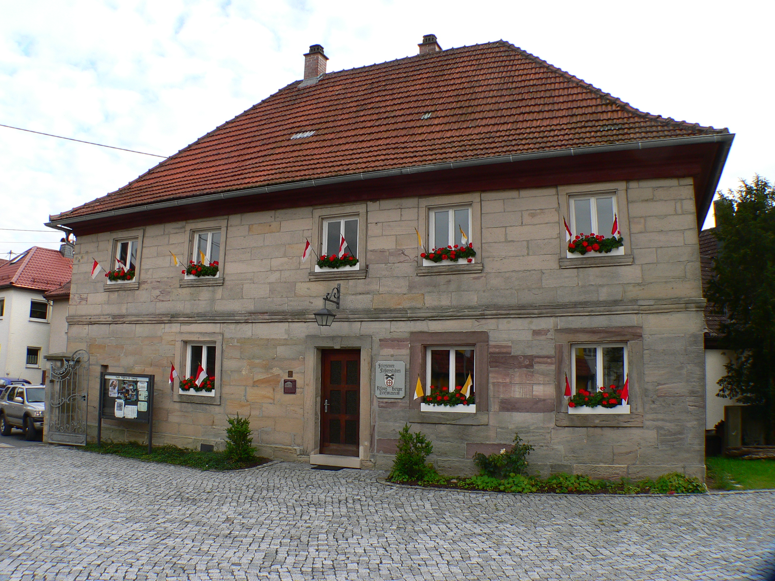 Altes Schulhaus, Gebäude "Friesen 8" in Kronach-Friesen, Bayern, Regierungsbezirk Oberfranken, Landkreis Kronach